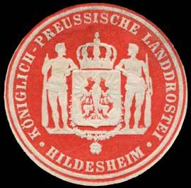 Sealing stamp Title: Königlich - Preussische Landrostei - Hildesheim Description: Briefsiegel, rot, weiß, geprägt Place: Hildesheim size: 3 cm